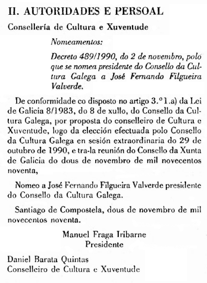 Diario Oficial de Galicia